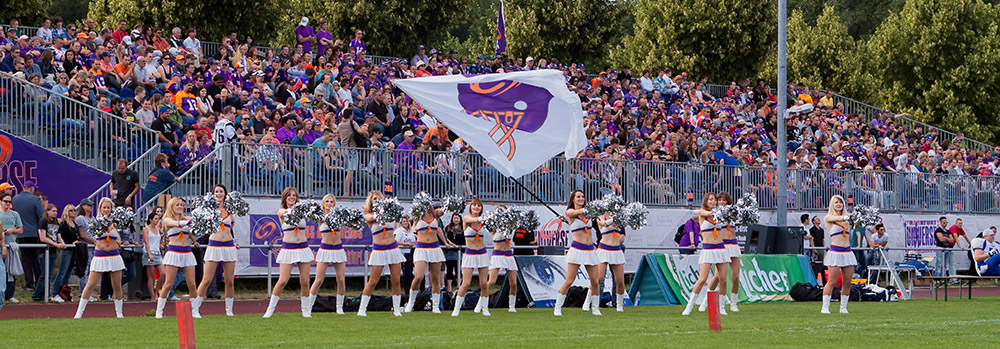 2213 Zuschauer beim American Footballs Spiel Frankfurt Universe vs. Ravensburg Razorbacks